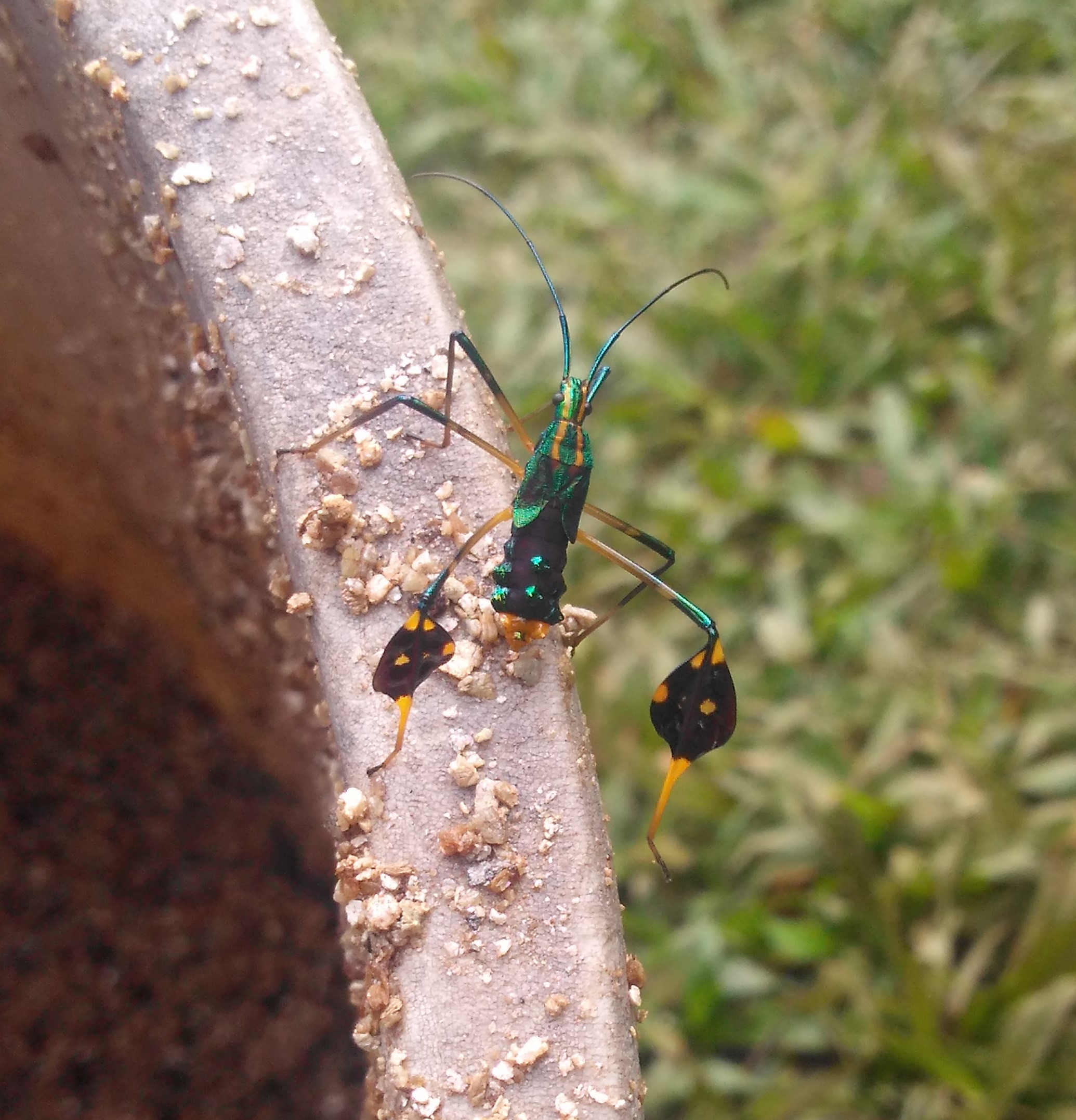 Hemiptera do gênero diactor que é considerado praga do maracujá (Foto tirada no Parque CEMUCAM - Cotia-SP)